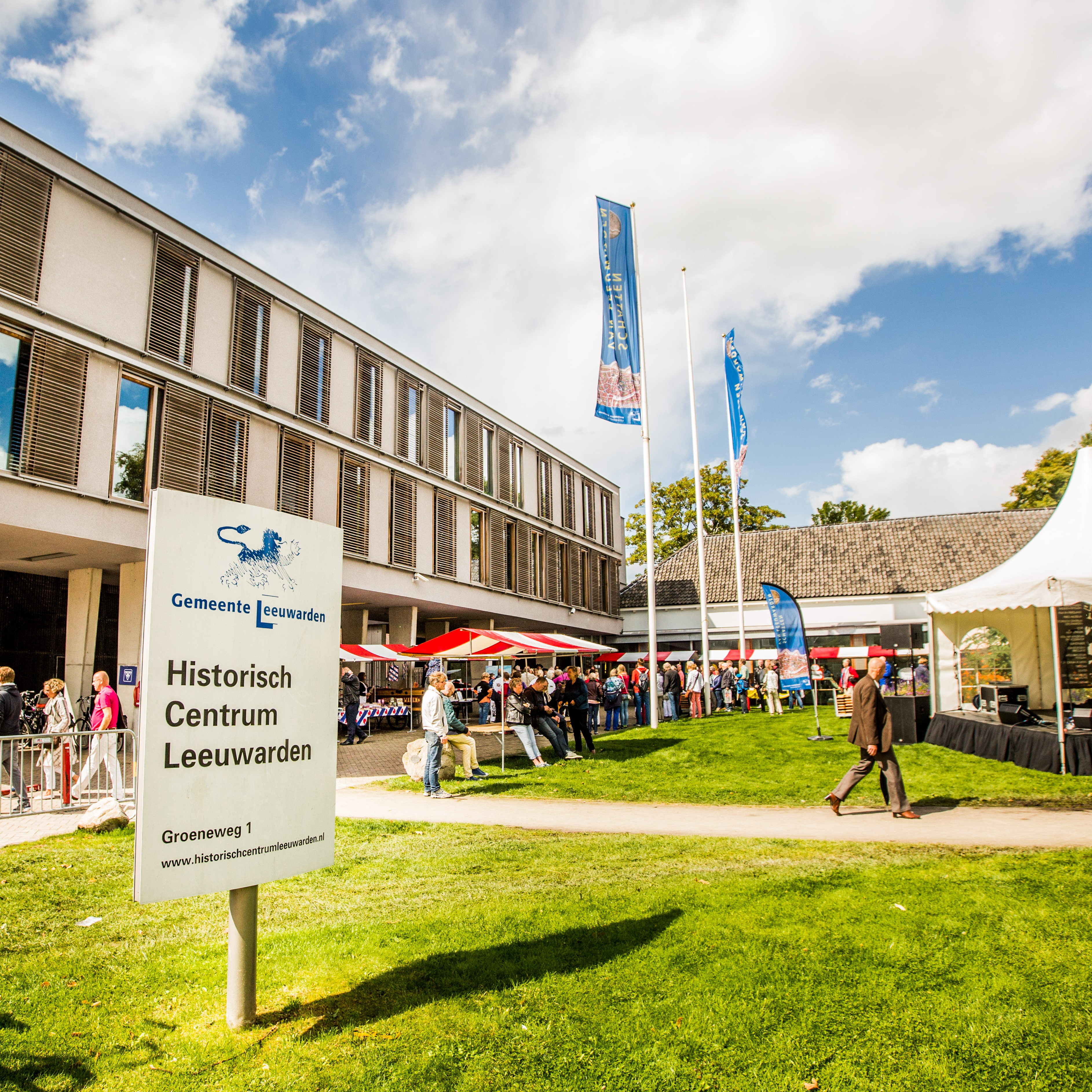 Historisch Centrum Leeuwarden, Groeneweg 1